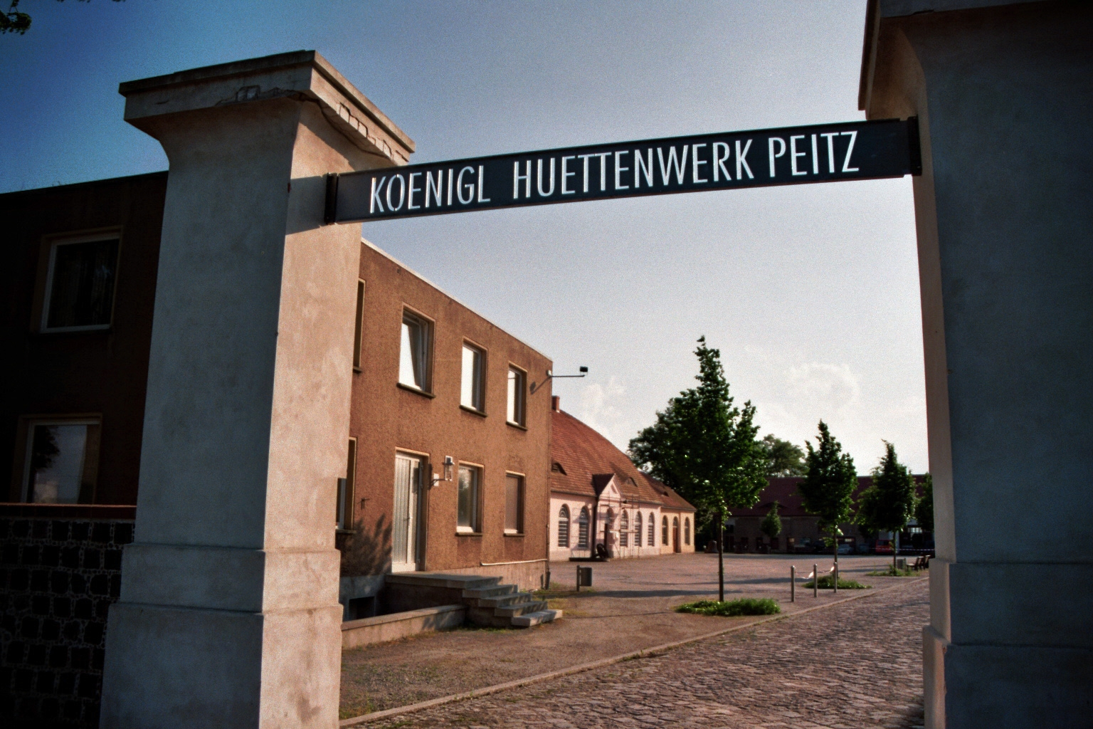 Tor des ehemaligen Königlichen Hüttenwerks Peitz in Brandenburg. Das Eisenhüttenwerk wurde im 16. Jahrhundert angelegt. Die heutigen Gebäude wurden 1810 errichtet. Sie stehen unter Denkmalschutz.